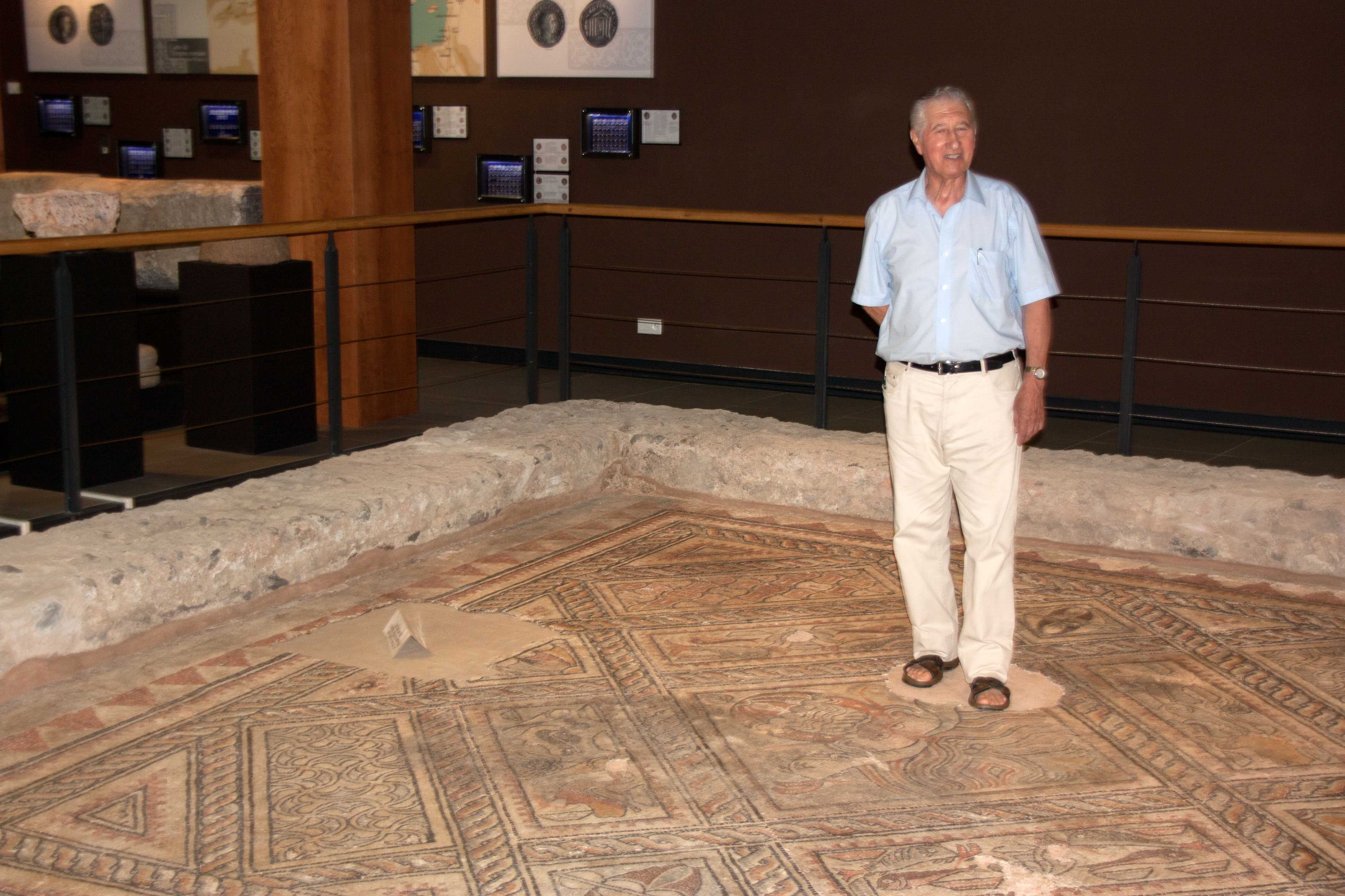 Sylvain Dousseau et la mosaïque du Dieu Océan du domaine de Saint-Chéron, Espace-Muséographique de Maubourguet, Maubourguet, Hautes-Pyrénées, France